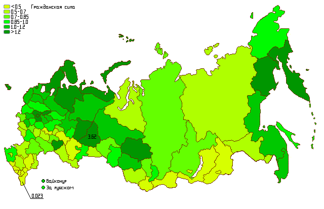 Результаты политической партии "Гражданская сила" на парламентских выборах 2007 года (по регионам)